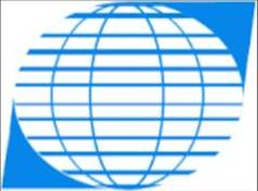 Emblemo de Internacia Spiritisma Konsilio